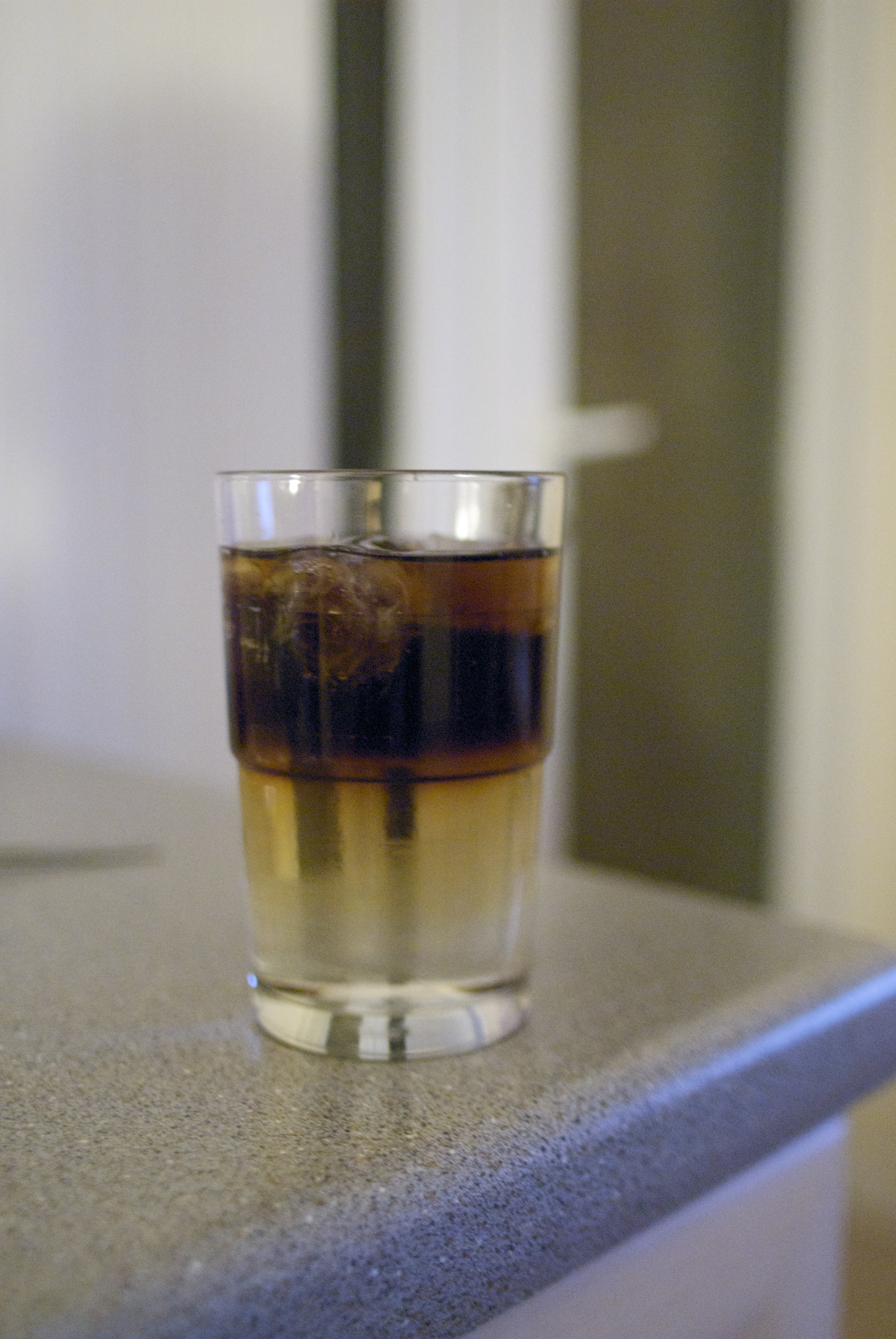 Malibu and Coke